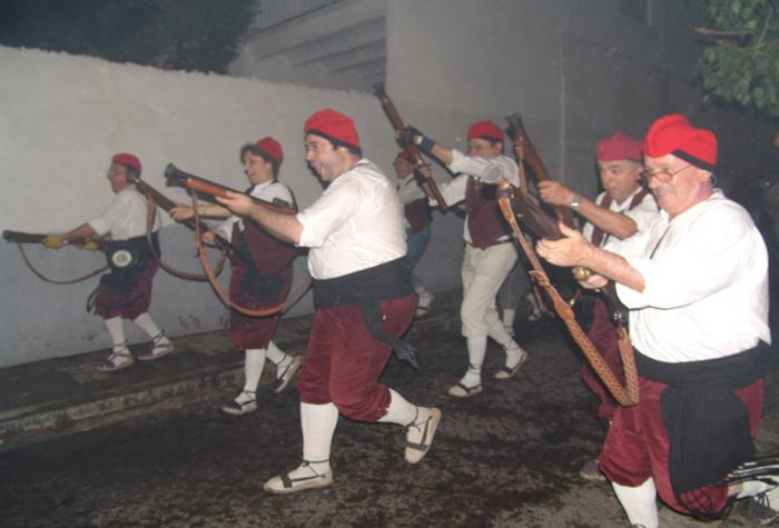 Trabucaires defendiendo Premià de Mar del ataque de los piratas